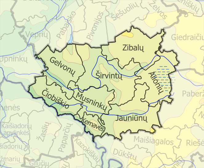 Starostwa w gminie Szyrwibty